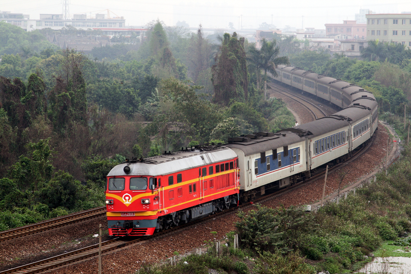 东风4B型柴油机车牵引三茂铁路股份有限公司客车穿行于广州市郊。